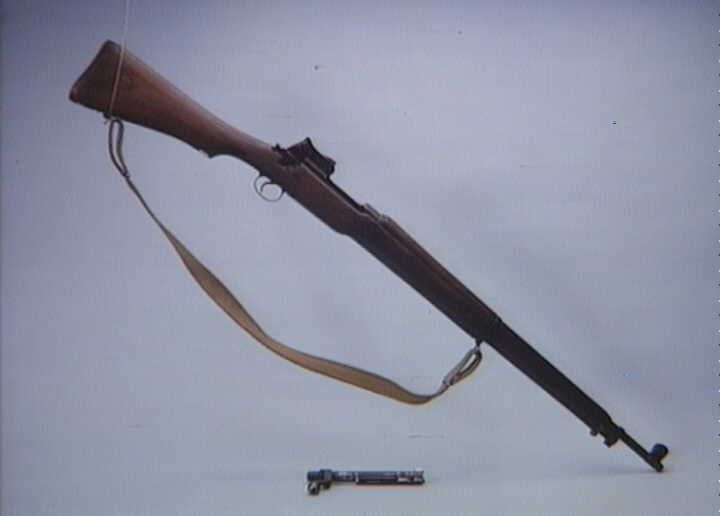 US riffel, cal.30, M1917 - Pattern 14. Militærgevær P-14 benyttet af modstandsgruppe i Haslev. Typen fremstilledes i USA til brug for den britiske hær under første verdenskrig.